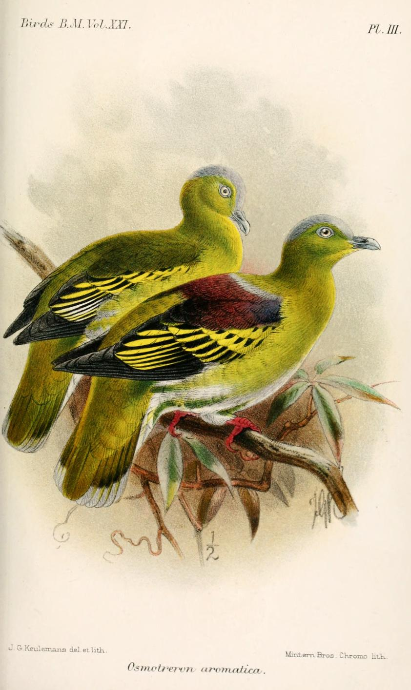 Osmotreron aromatica = Treron pompadora aromatica, Pompadour Green Pigeon ssp.